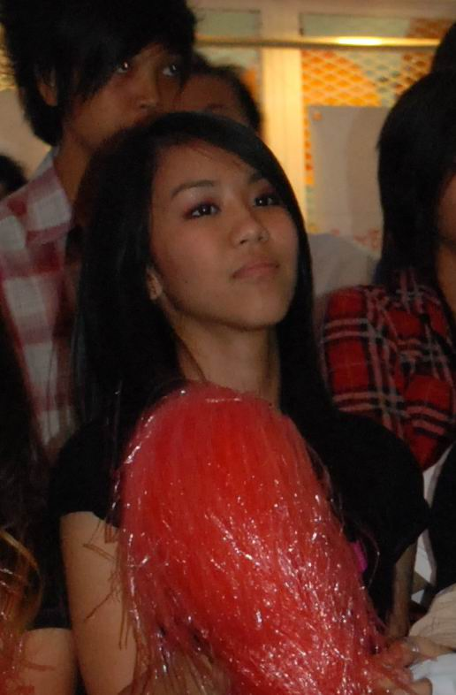 กุลมาศ_ลิมปวุฒิวรานนท์ ศิลปินค่าย Kamimaze